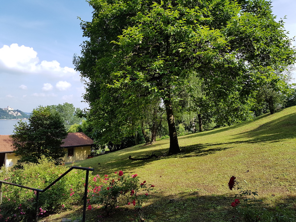 Il Museo Meina è circondato da un grande parco oggi fruibile dai visitatori